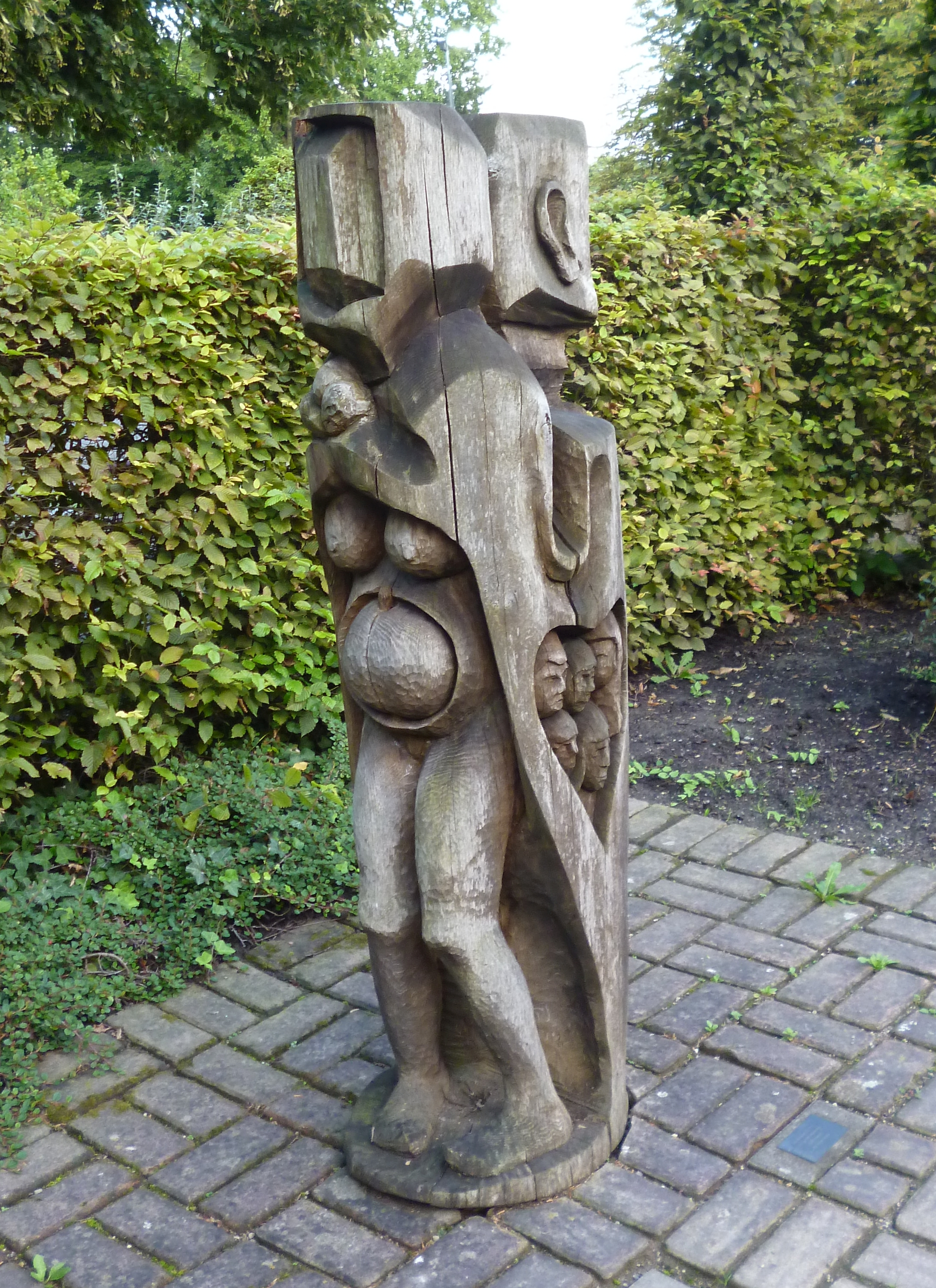 Mile Prerad: "Adam und Eva (Entstehung der Menschheit)", Eichenskulptur im Westfalenpark, Dortmund